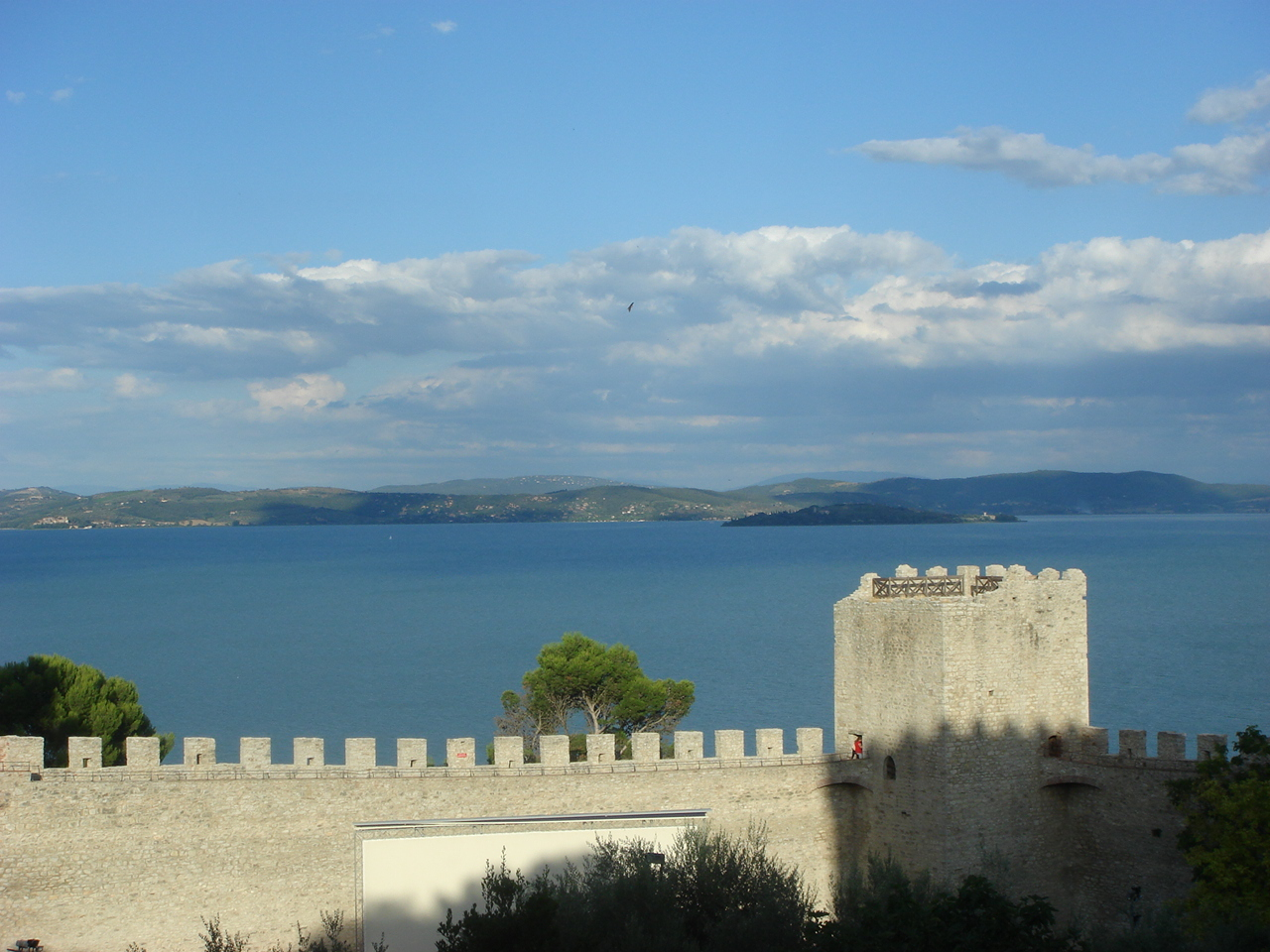 Vista del lago Trasimeno desde Castiglione del Lago (Perugia, Italia)